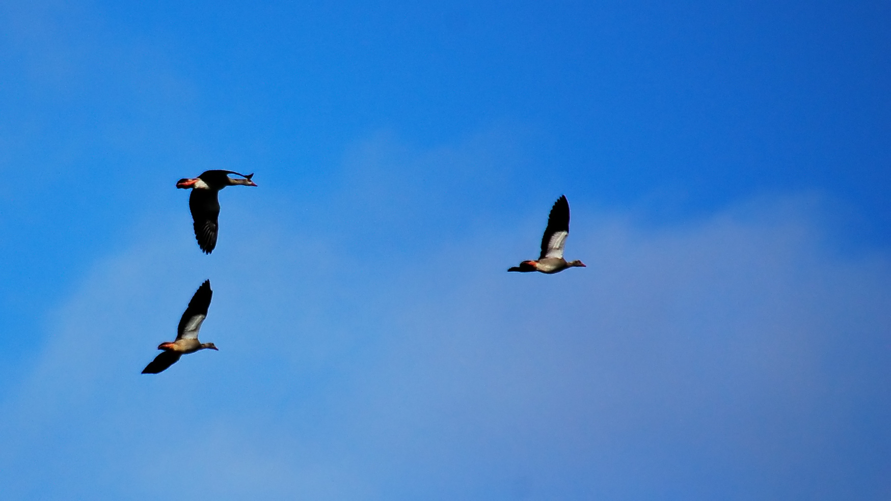 Nilgänse im Oppenweher Moor